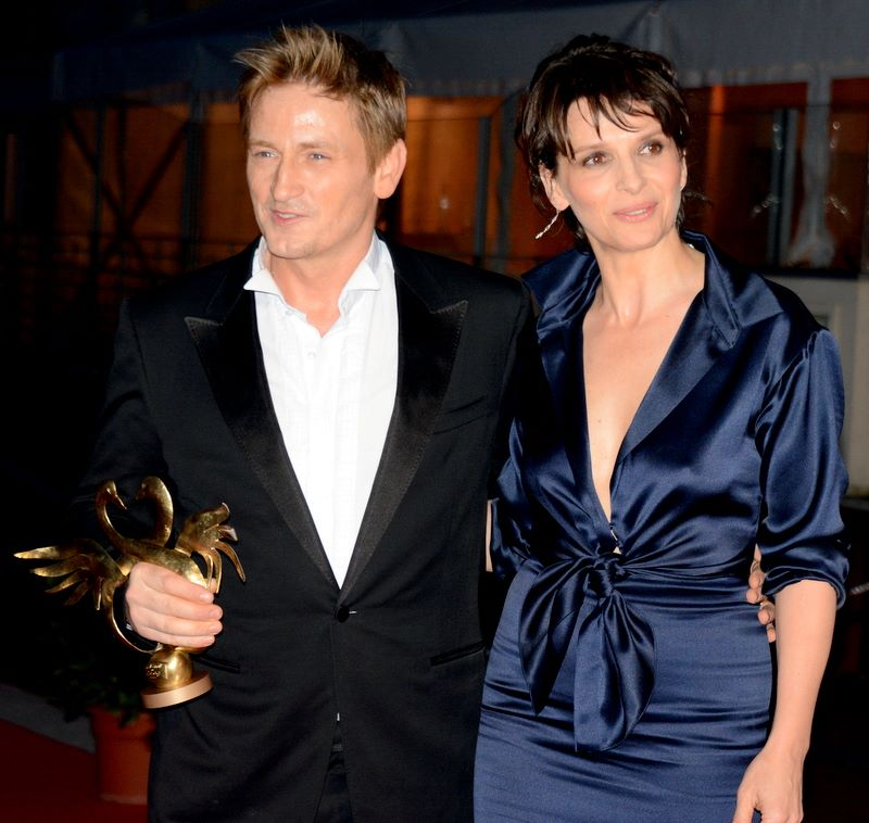 Benoît Magimel et Juliette Binoche au festival du film de Cabourg